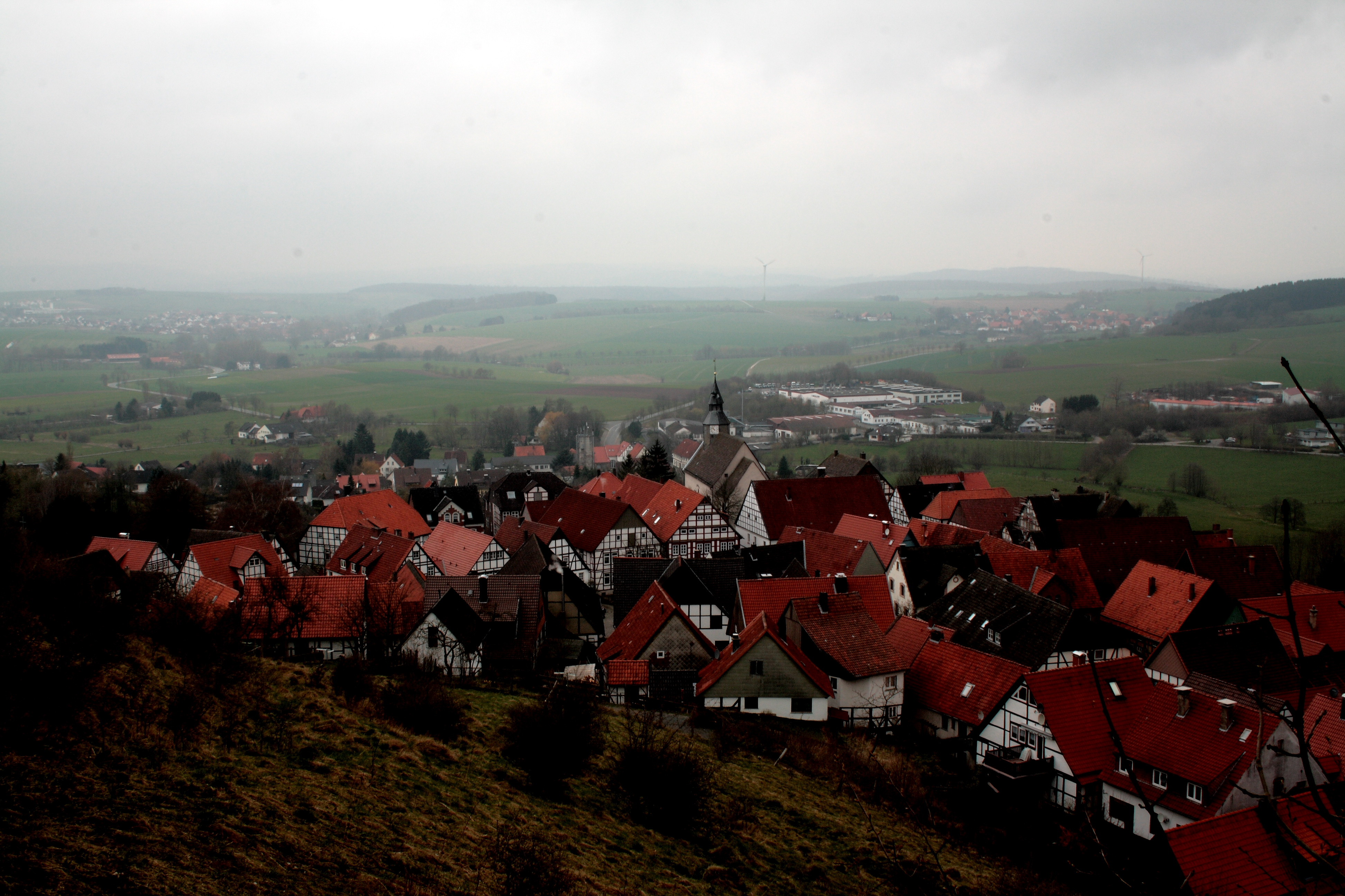 Blick auf Schwalenberg, Schieder-Schwalenberg, Nordrhein-Westfalen, Deutschland